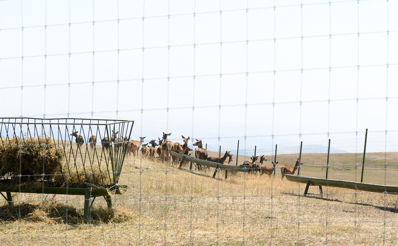 Шамахинский сафари-парк